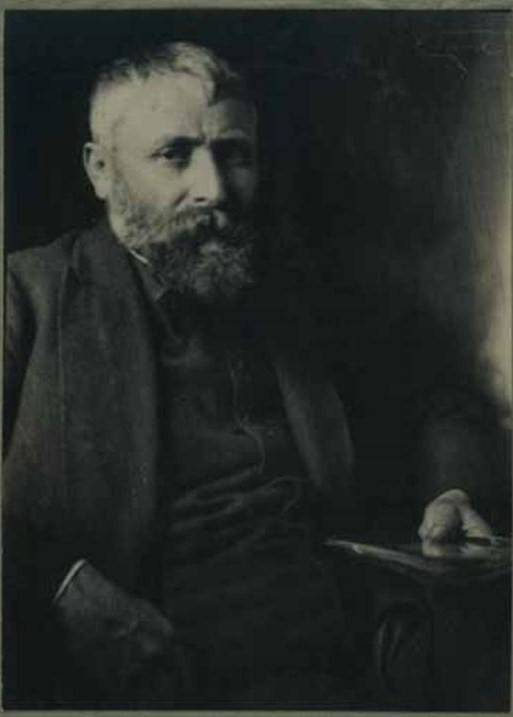 Foto-Portrait Carl Johann Becker-Gundahl (1907)